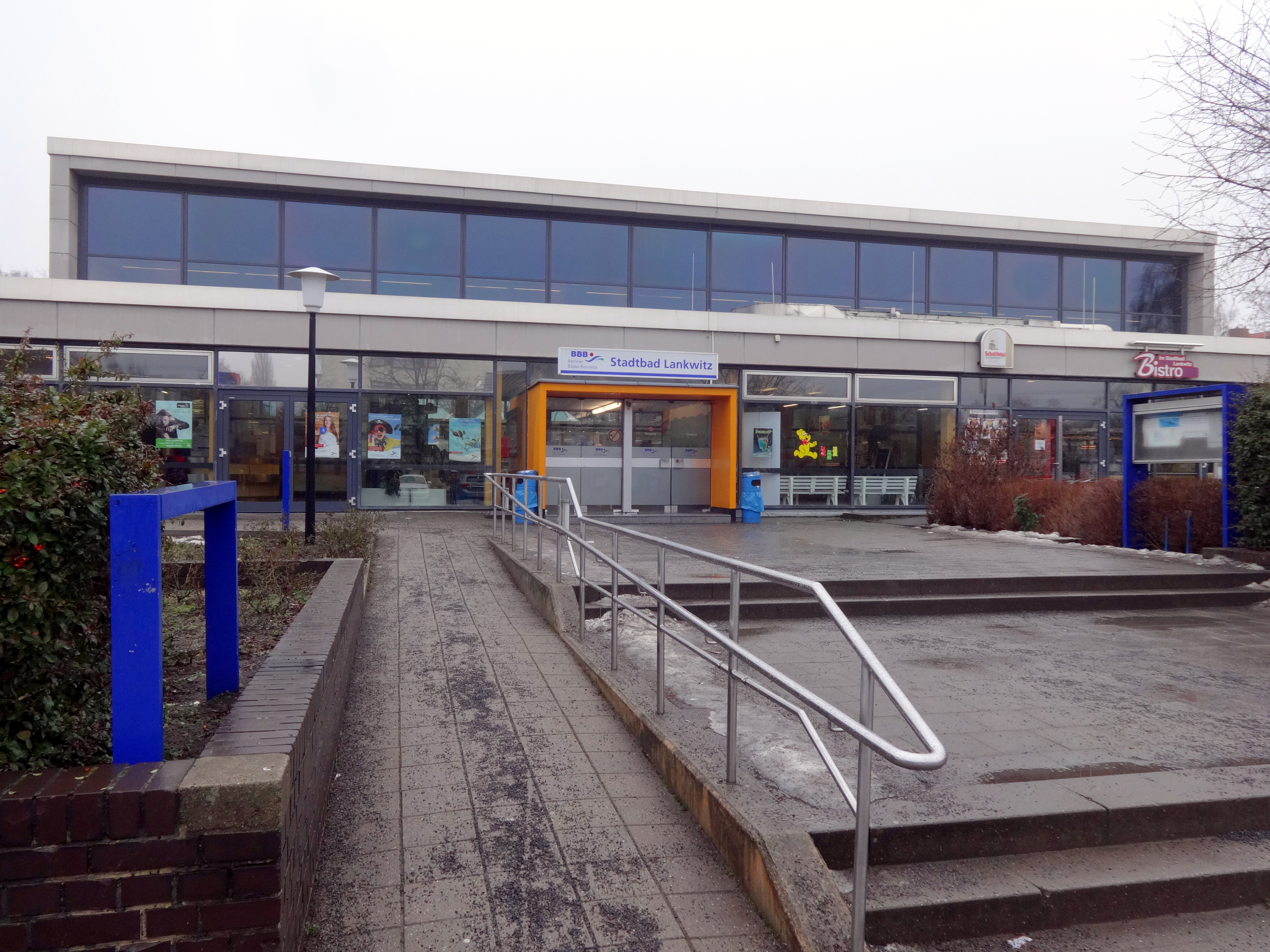 Stadtbad Lankwitz